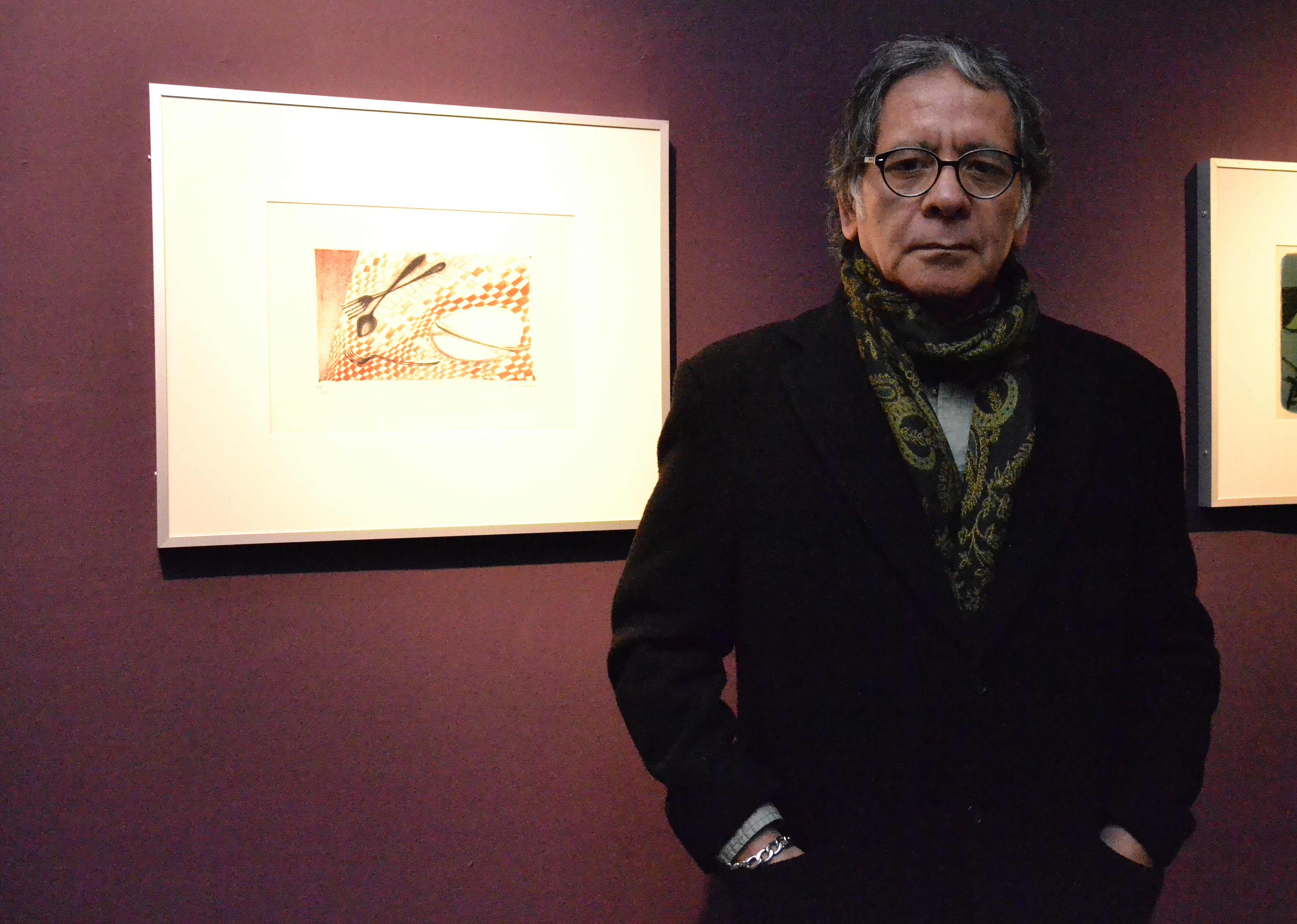 El actor chileno Patricio Contreras en la inauguración de la muestra del pintor Nemesio Antúnez en el Palais de Glace, Buenos Aires, 10 de junio de 2014